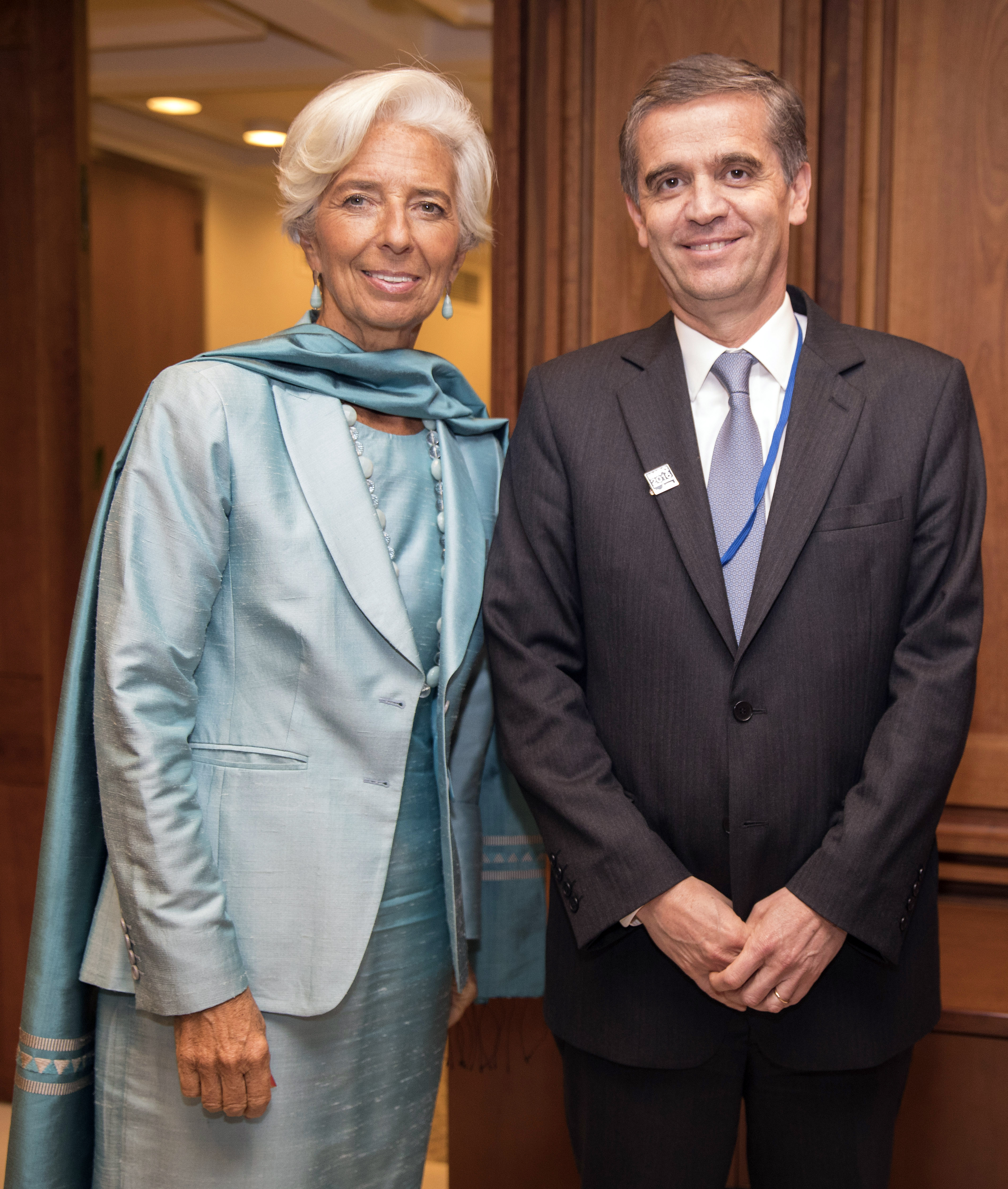 En el marco de la Reunión Anual de las Juntas de Gobernadores del Fondo Monetario Internacional y el Banco Mundial, que se realizan en Washington, Estados Unidos, el Presidente del Banco Central de Chile, Rodrigo Vergara, se reunió con la Directora Gerente del FMI, Christine Lagarde. En la reunión, se conversó sobre la situación económica de Chile e intercambiaron opiniones sobre la economía mundial y sobre opciones de políticas para reactivar economías con bajo crecimiento. Poco antes, el Presidente del Banco Central se había reunido con la Presidenta de la Reserva Federal de Estados Unidos, Janet Yellen.